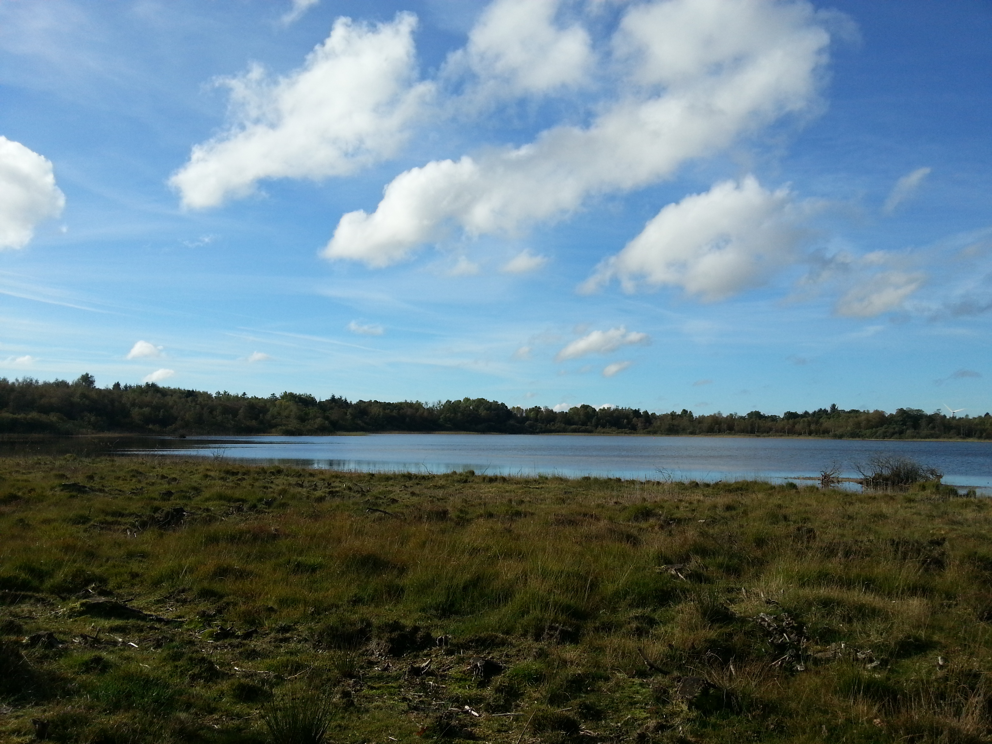 Udsigt over Skærsø, en lobeliesø syd for Egtved